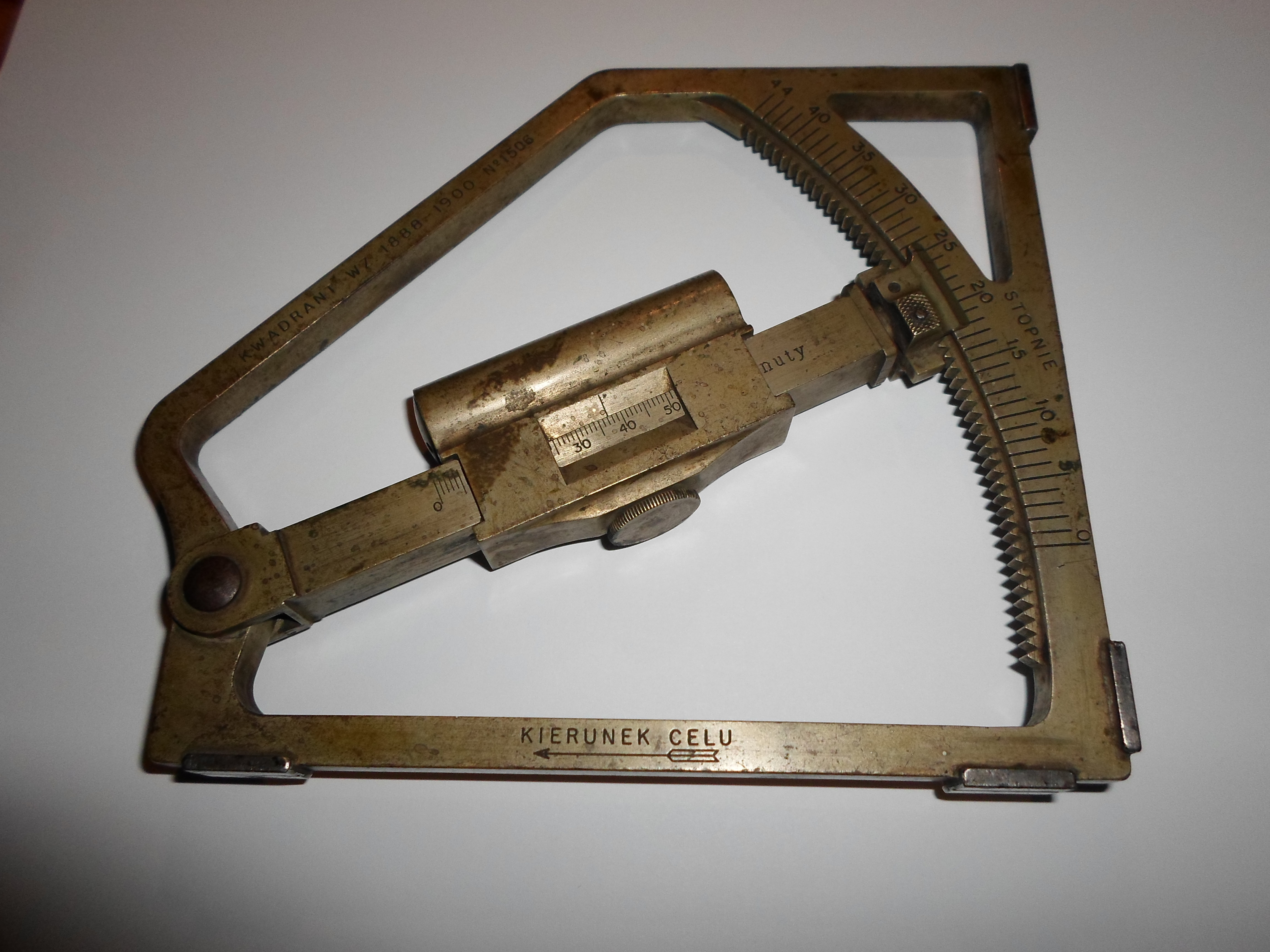 Kwadrant 1888-1900 fot. Grzegorz Framski